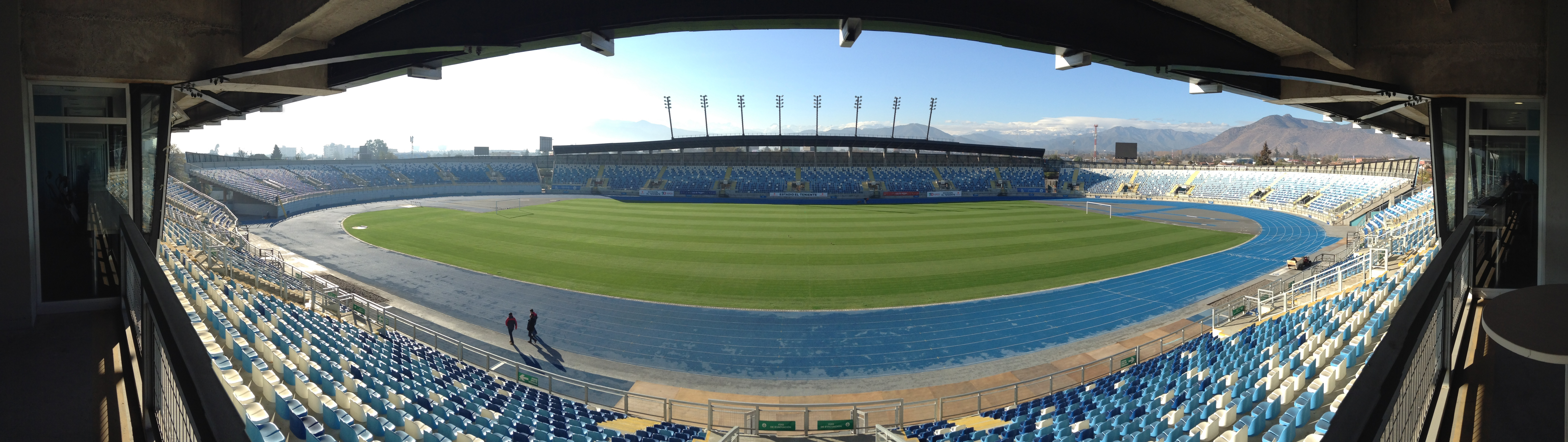 Estadio Bicentenario El Teniente – Rancagua, Chile